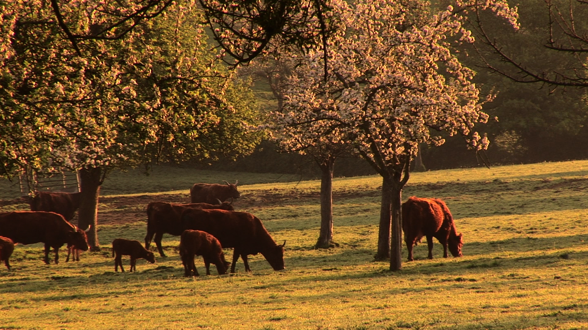 Kühe aus der Normandie, Screenshot aus dem Film Voices of Transition